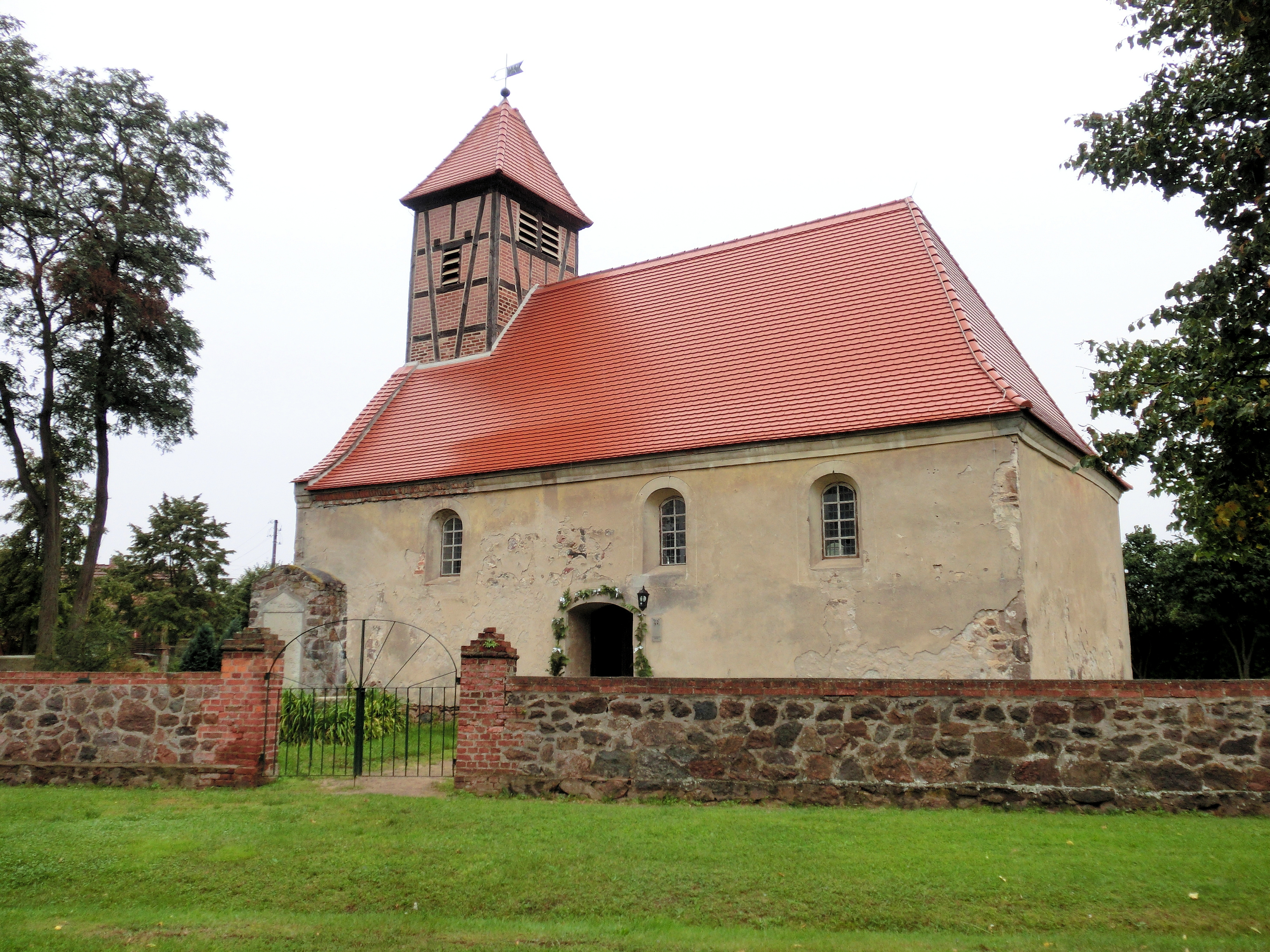 Ringfurth Kirche